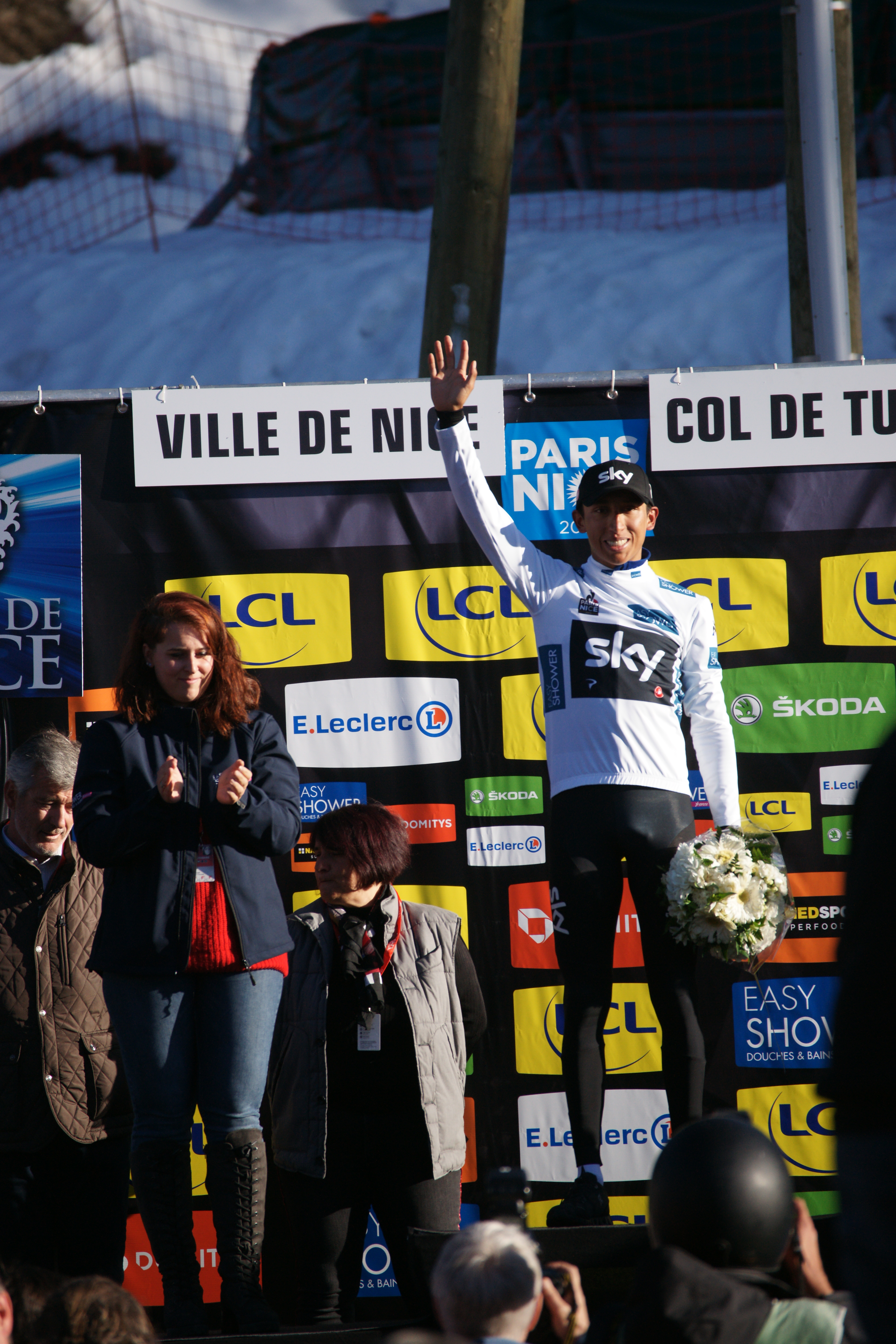 Egan Bernal, blanc, Paris-Nice 2019